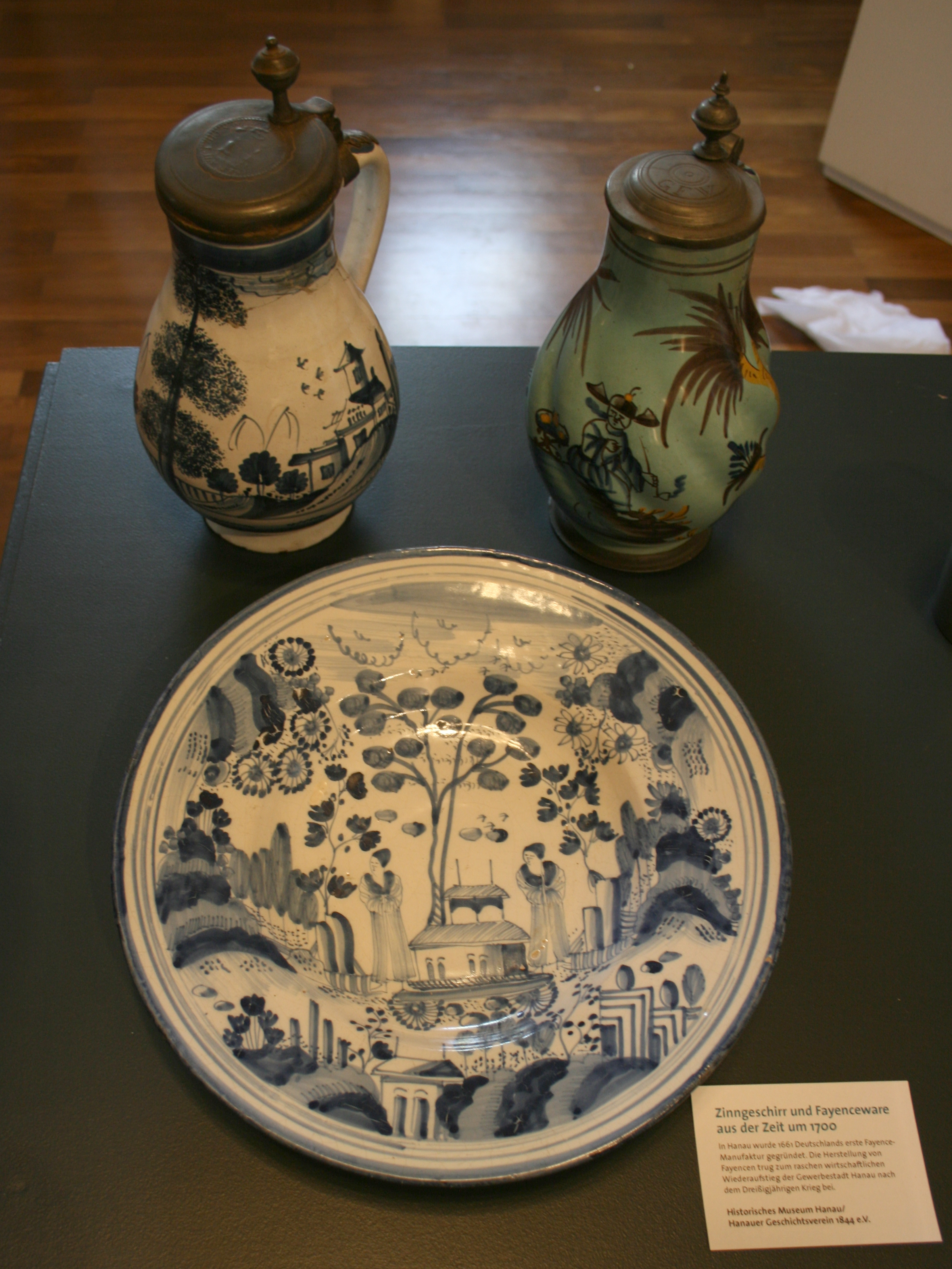 Produkte der Hanauer Fayencemanufaktur; ein Teller und zwei Krüge aus dem Bestand des Hanauer Geschichtsvereins/ Historisches Museum Hanau.